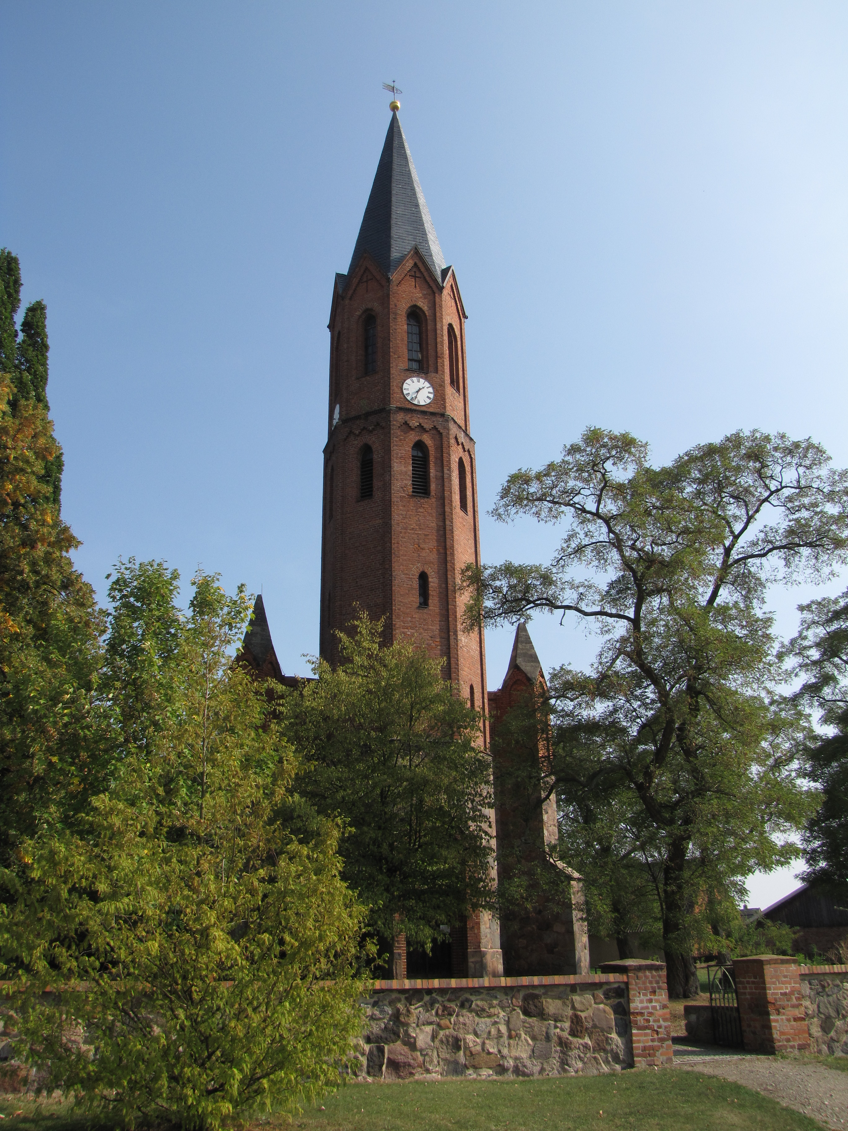 Dorfkirche Bochow, Gemeinde Niedergörsdorf, Lkr. Teltow-Fläming, Brandenburg, Westseite der Kirche mit Turm